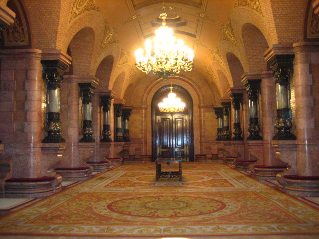 Vista interior del Parlament de Catalunya